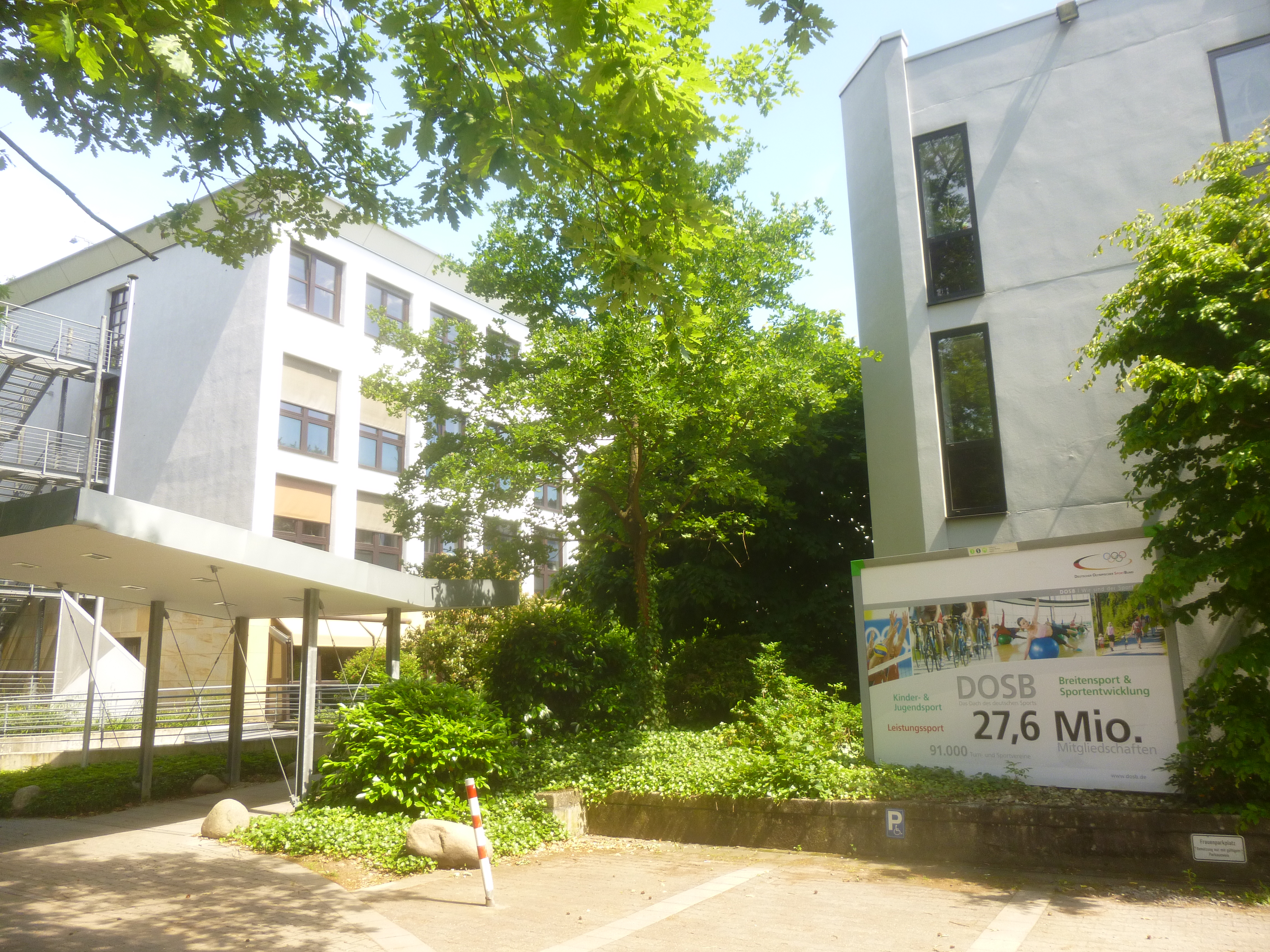 Bundesgeschäftstelle des Deutschen Olympischer Sportbunds in Frankfurt am Main im Juni 2013